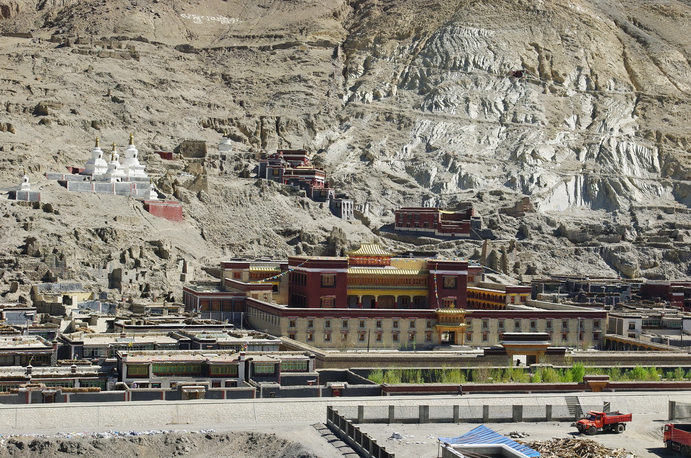 Nordkloster Sakya